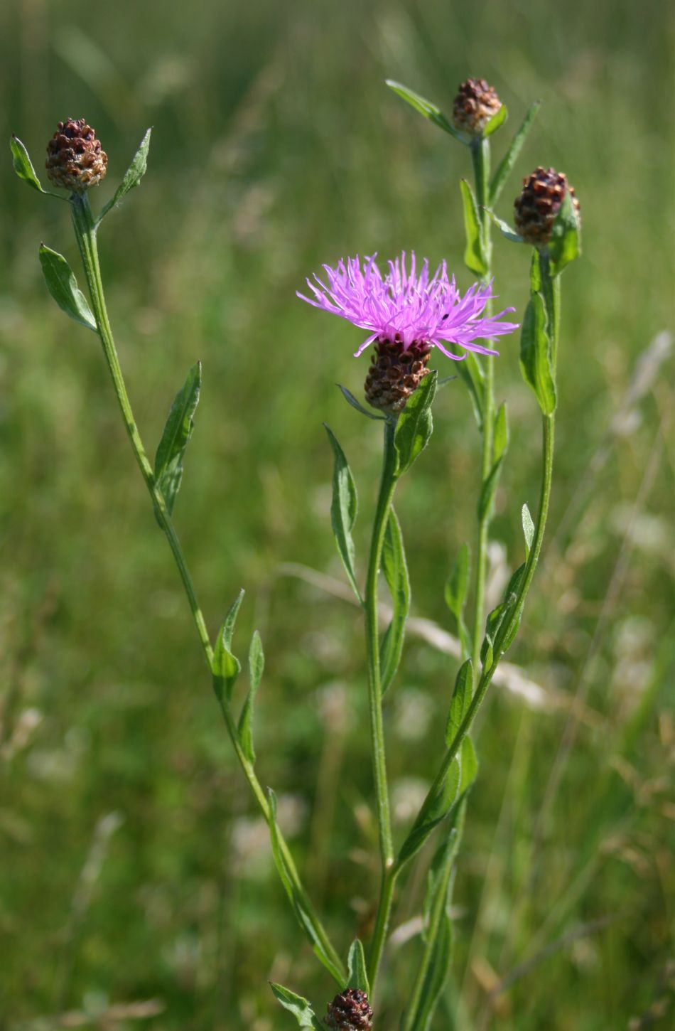 Wiesen-Flockenblume (Centaurea jacea subsp. jacea), Korbblütler (Asteraceae) - Österreich/Austria/Autriche: Oberösterreich, Hausruckviertel, Niederholzham N Schwanenstadt